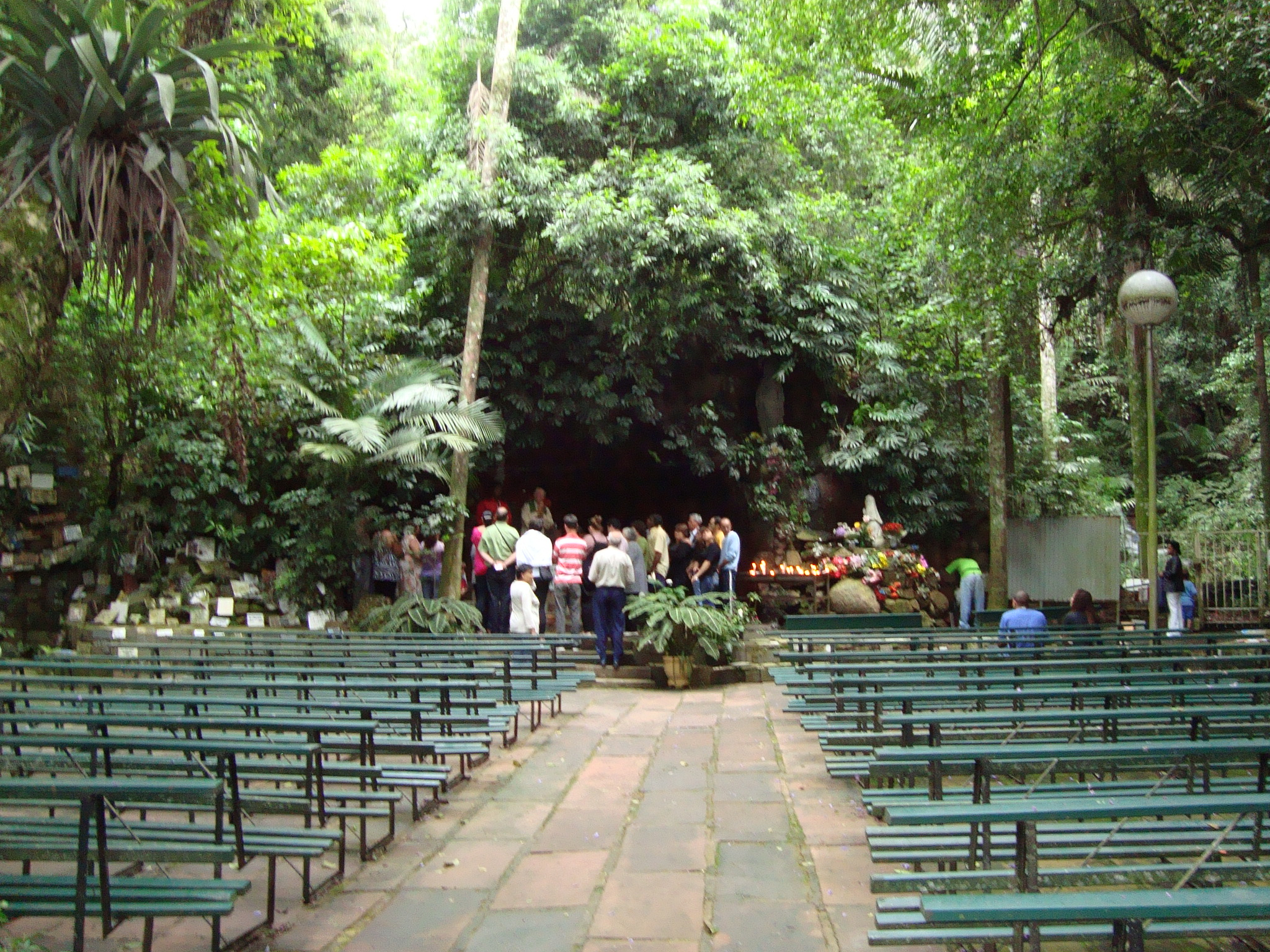 Gruta de Nossa Senhora de Lourdes, no bairro Cascata, em Porto Alegre